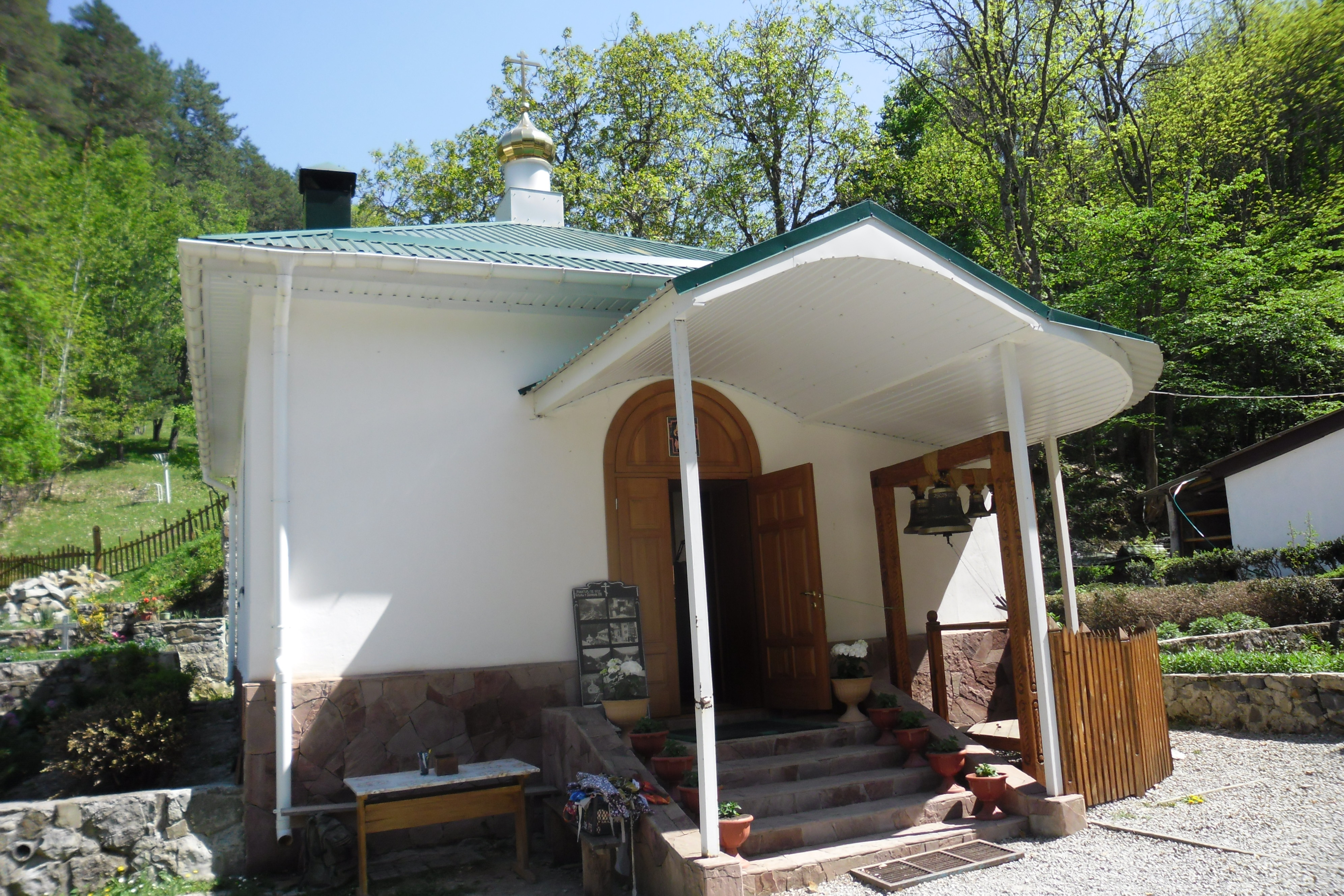 Фото